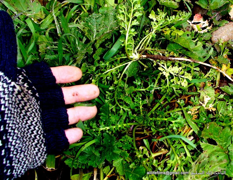 نباتات برّية سورية تؤكل